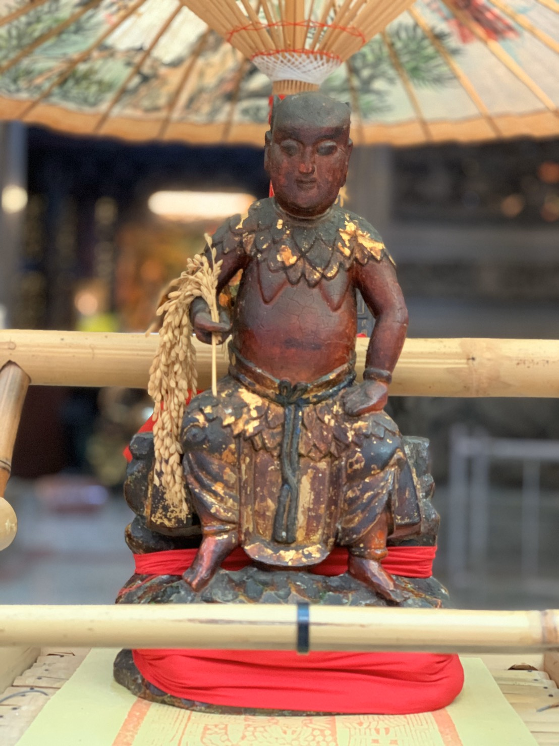 金包里聖德宮所供奉之神農大帝，據傳已逾250年歷史。